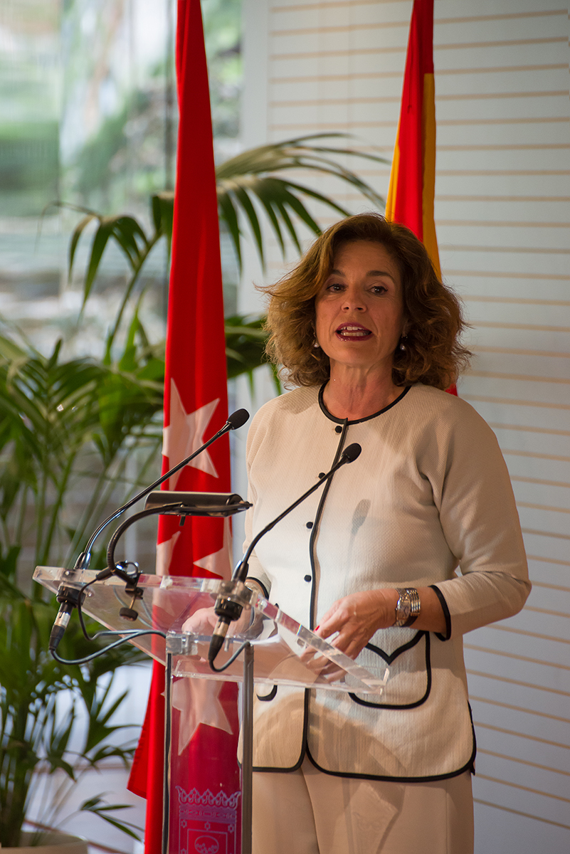 Ana Botella en un acto de homenaje a Fraga